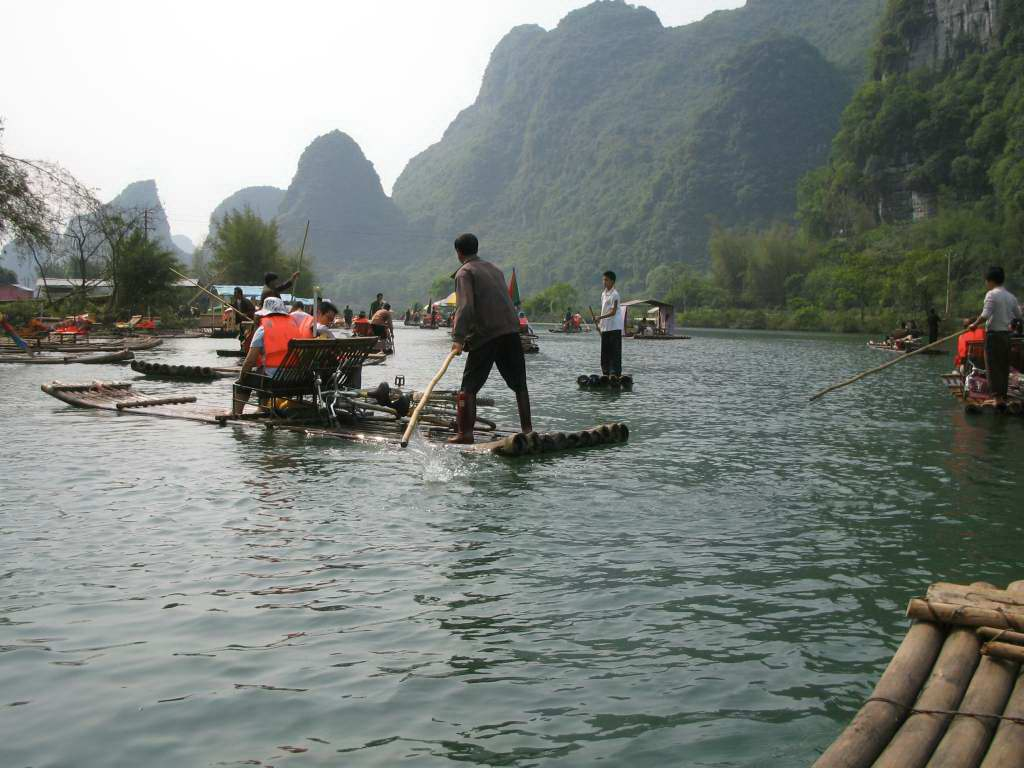 China,Guang Xi proven,Gui Lin,Yang Shuo, Yu Long River